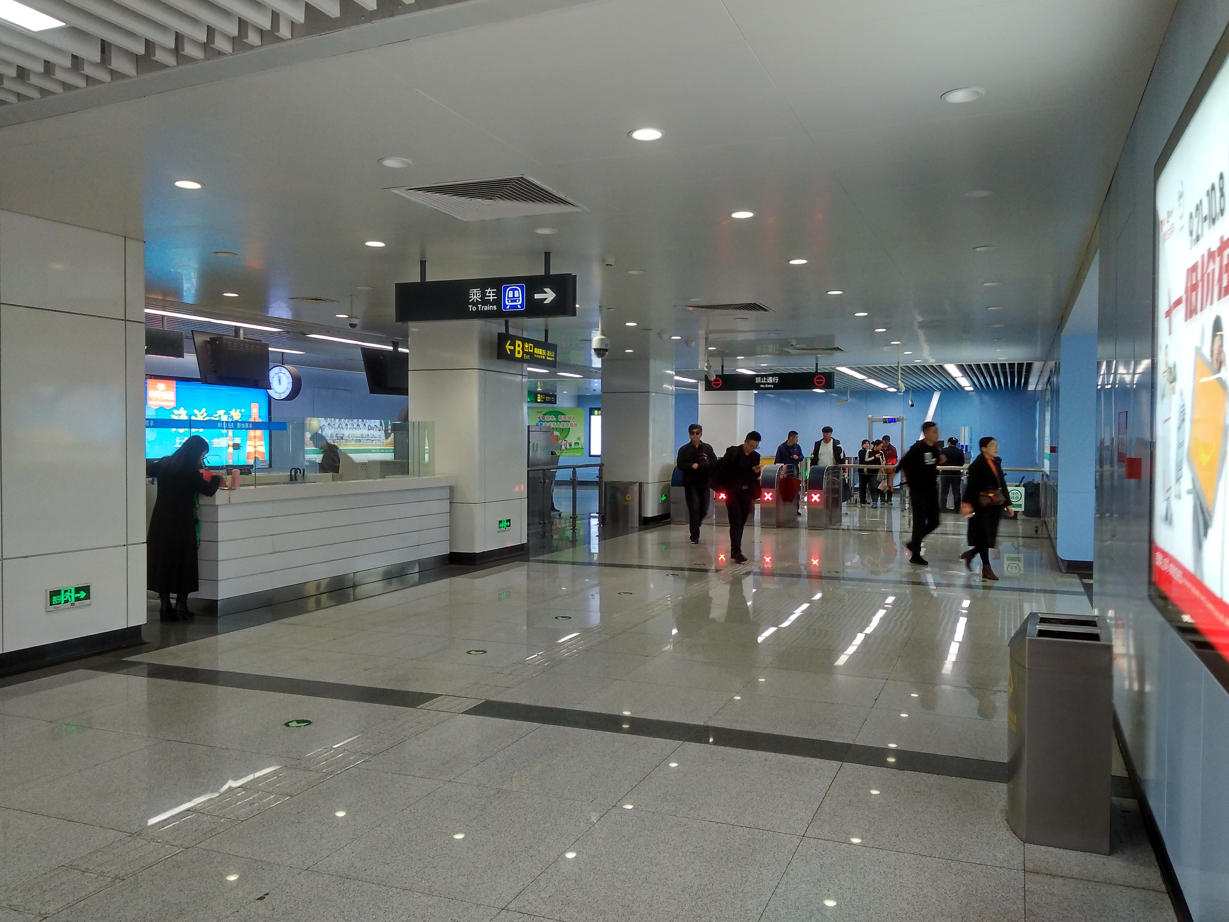 青岛地铁3号线敦化路站站厅层